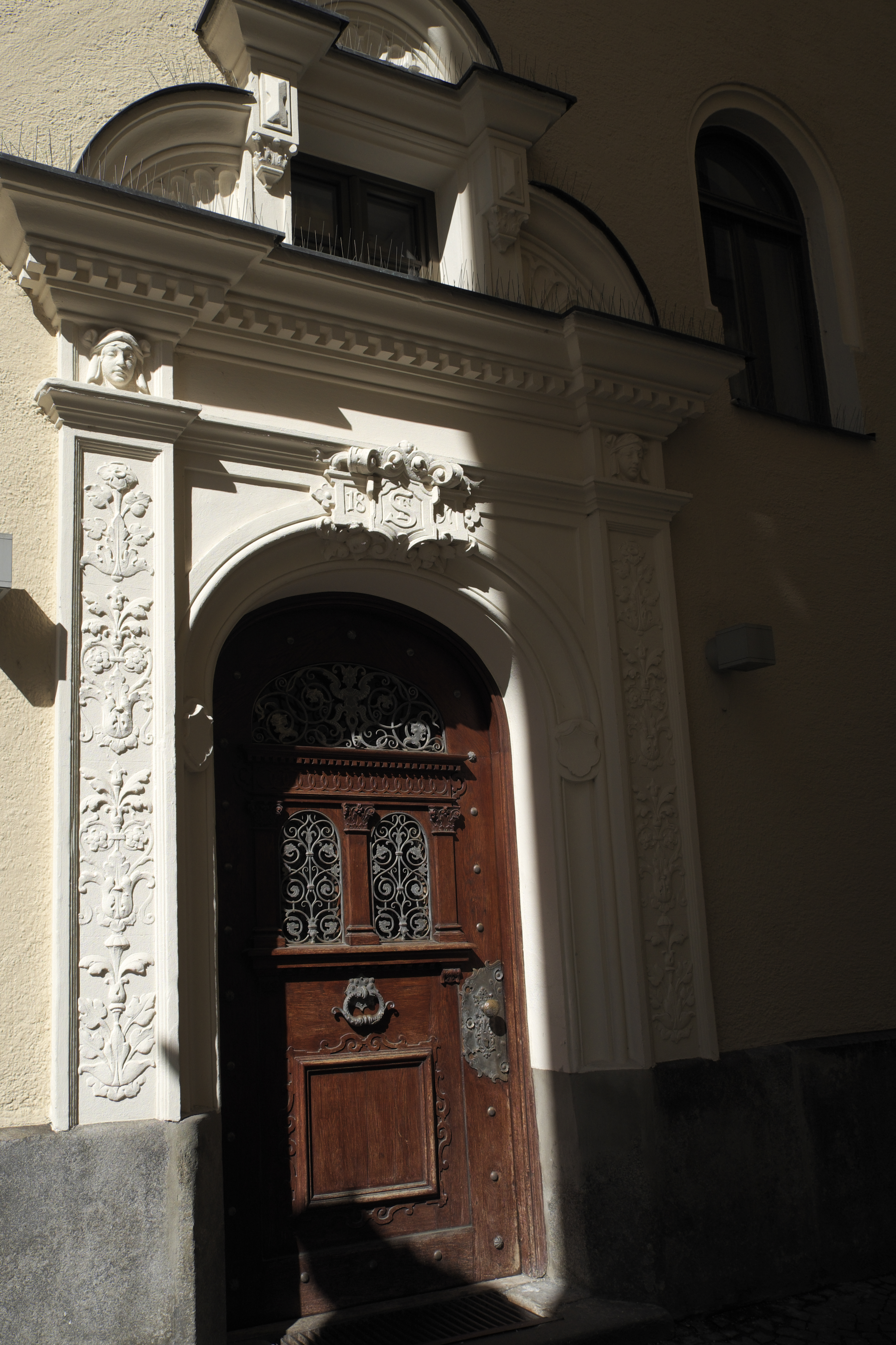 Mietshaus, heute Hotel, in der Heiliggeiststraße 6 in der Altstadt im Stadtbezirk Altstadt-Lehel in München (Bayern/Deutschland), 1897 von Ludwig Marckert erbaut, Tür